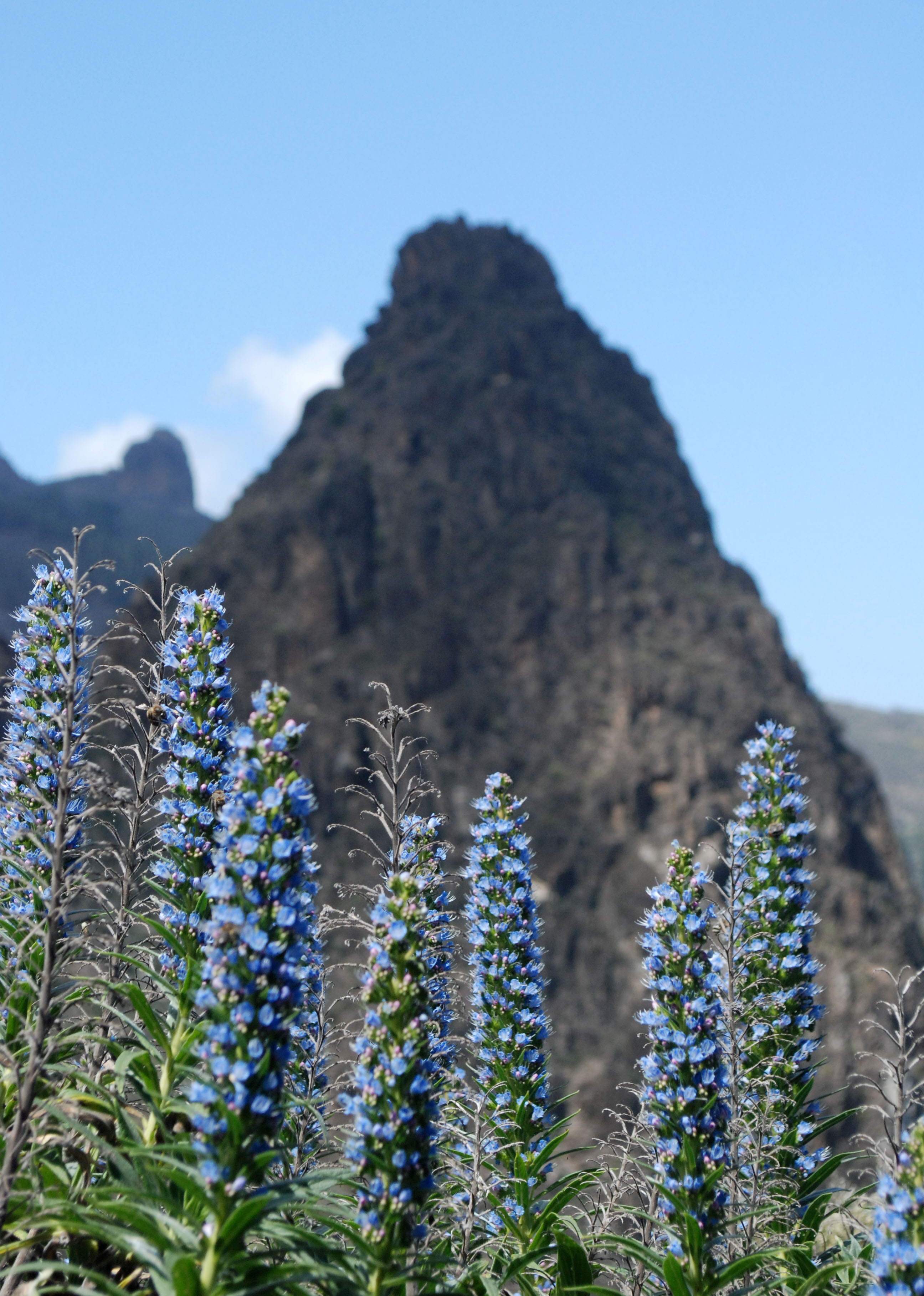 Tajinaste Azul de Tenteniguada o de Gran Canaria. Tašlḥiyt/ⵜⴰⵛⵍⵃⵉⵜ: ⵜⴰⵉⵏⴰⴵⵜ ⵏ ⵜⵏⵜⵏⵢⵡⴰⴷⴰ